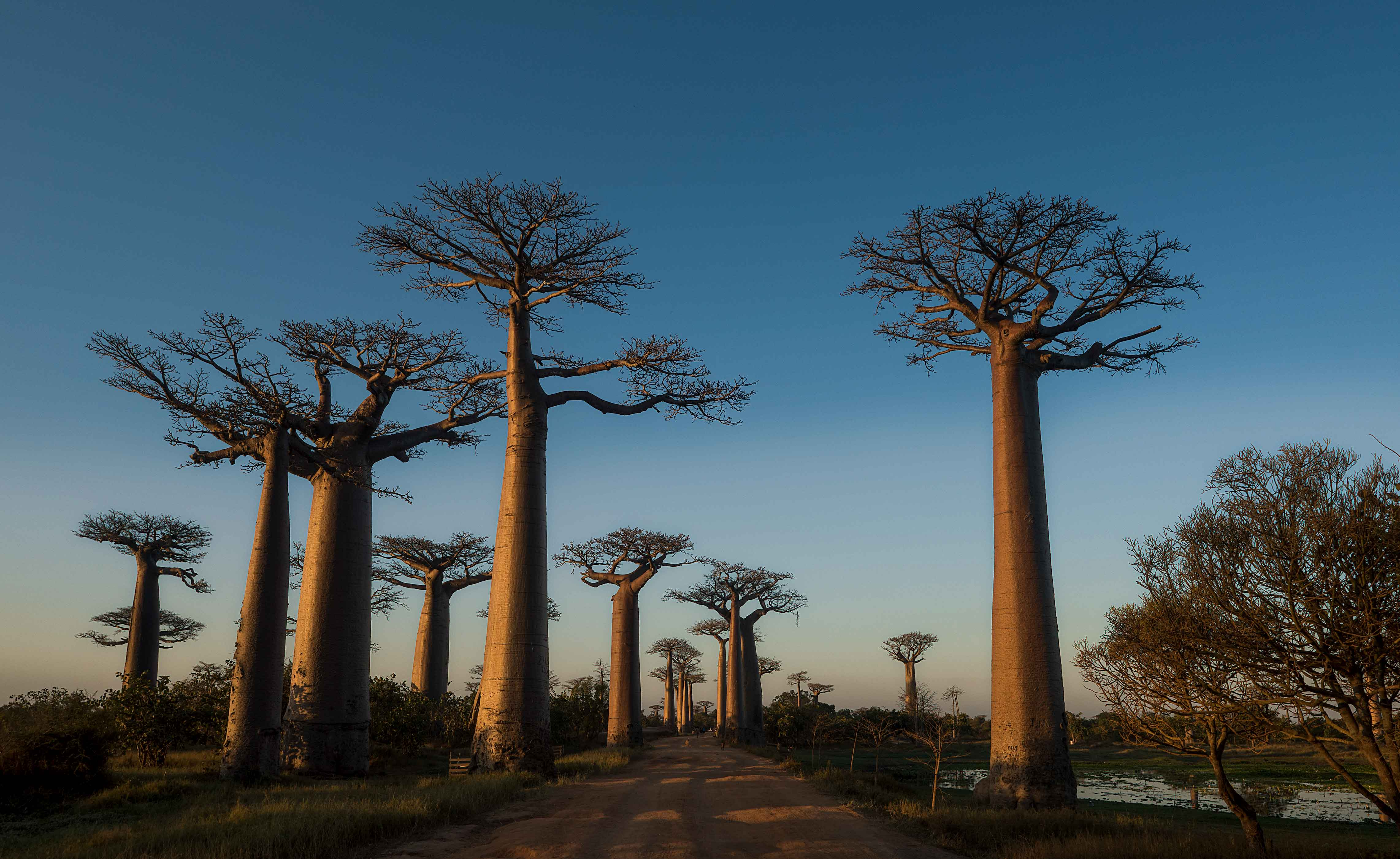 Madagascar